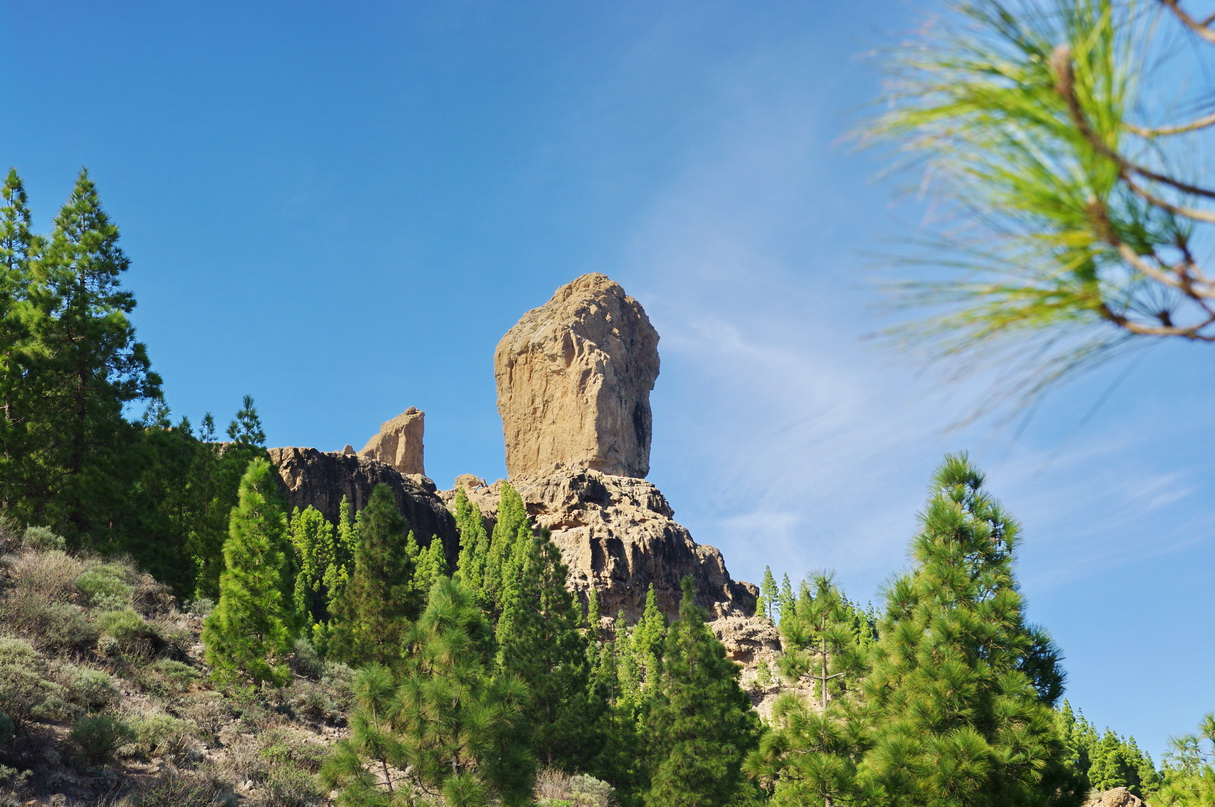 Roque Nublo, Gran Canaria